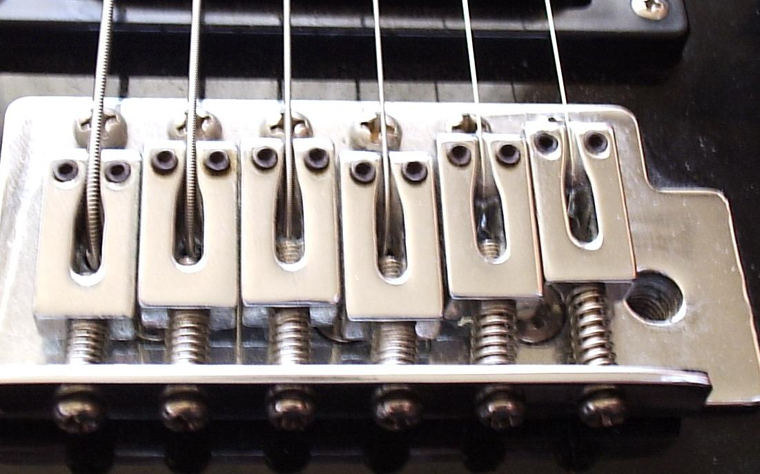 Bildbeschreibung: Das Bild zeigt die Brücke einer E-Gitarre (der Vibratohebel ist herausgeschaubt), mit besonderem Blick auf die 6 Reiter. Quelle: selbst fotografiert Fotograf: M. Kuhlberg (Benutzer:Netazon, eigenes Foto) Datum: 19. Februar 2006